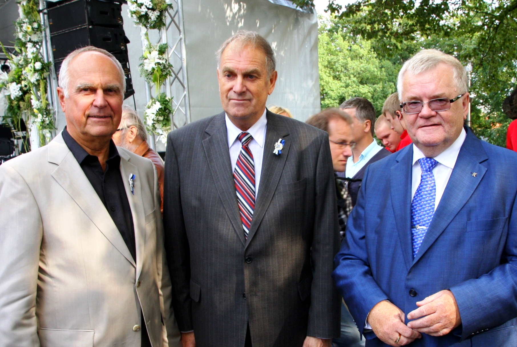 Indrek Toome, Tiit Made ja Edgar Savisaar 2011. aasta taasiseseisvumispäeval Harjumäel.